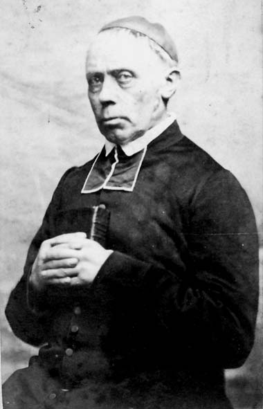 Johann Michael Schang, Pfarrer von Pirmasens, Pfalz